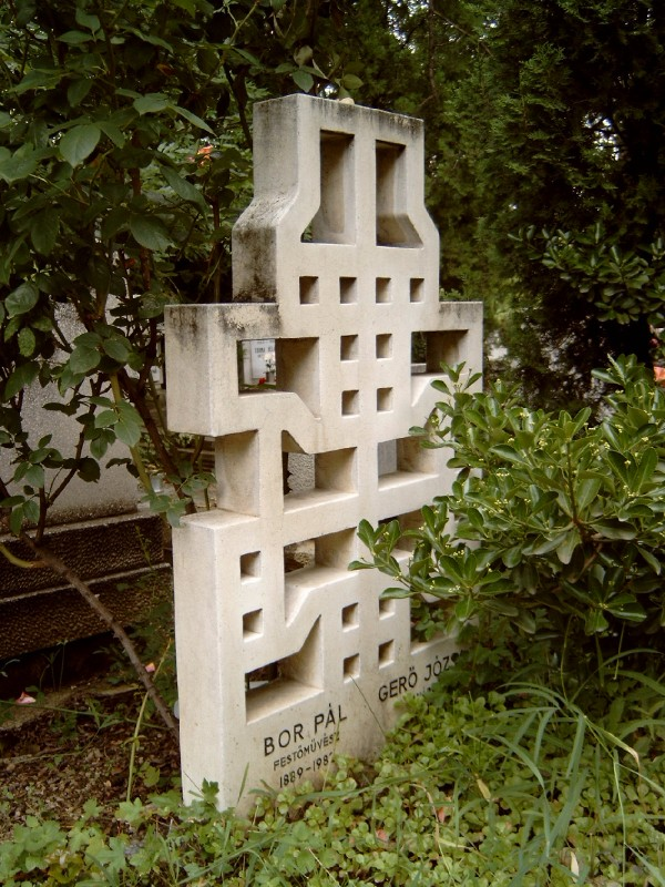 Bor Pál (Budapest, 1889. március 2. – Budapest, 1982. január 31.) festő, grafikus, szobrász, művészeti író sírja Budapesten. Farkasréti temető: 34/2-2-33